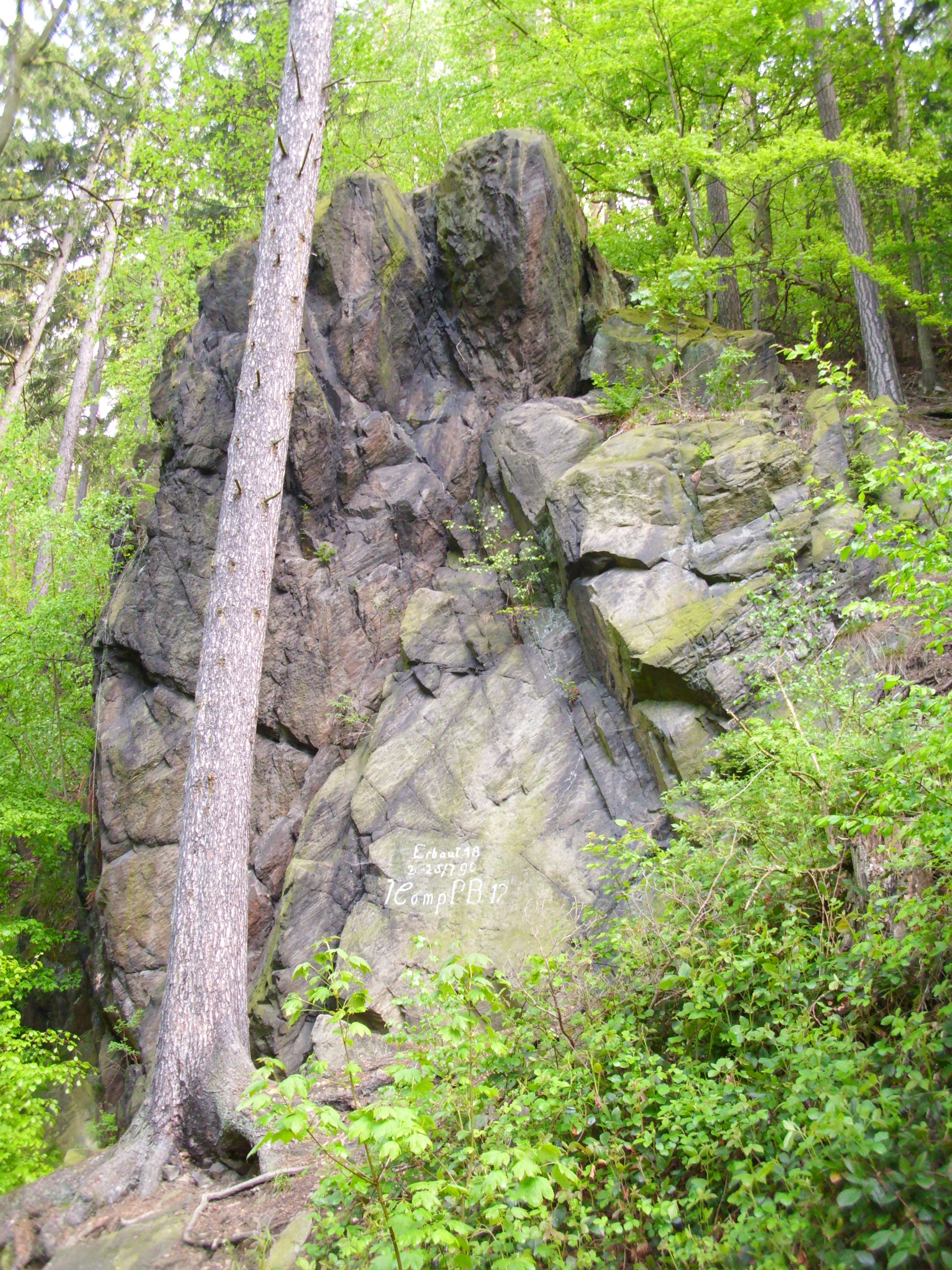 An diesem Felsen haben sich die Arbeite rund Bergleute verewigt, welche den Fußweg zwischen Seifersdorf und Rabenau angelegt haben. Der Felsen liget unittelbar am Weg Kurz nach der Ortschaft Spechtritz an der Roten Weißeritz